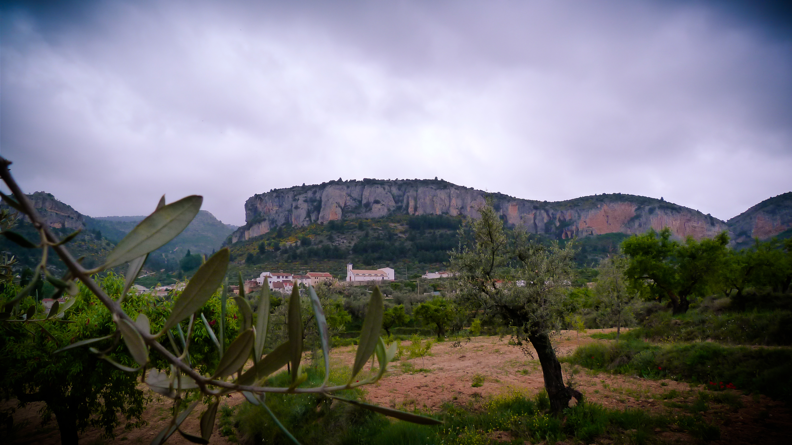 Panorámica desde el barranco cantón con la iglesia y el calar al fondo un día nublado